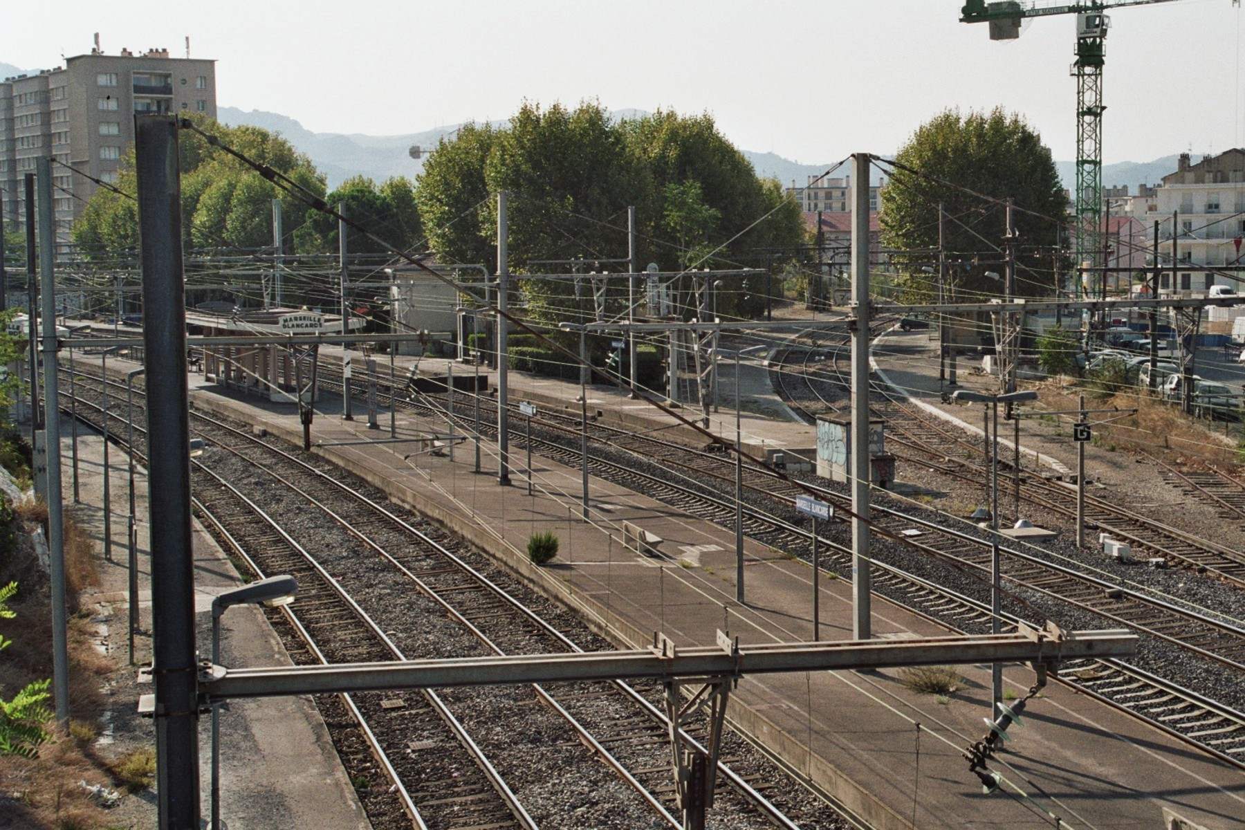 Gare de Marseille-Blancarde, vue générale, voies et quais